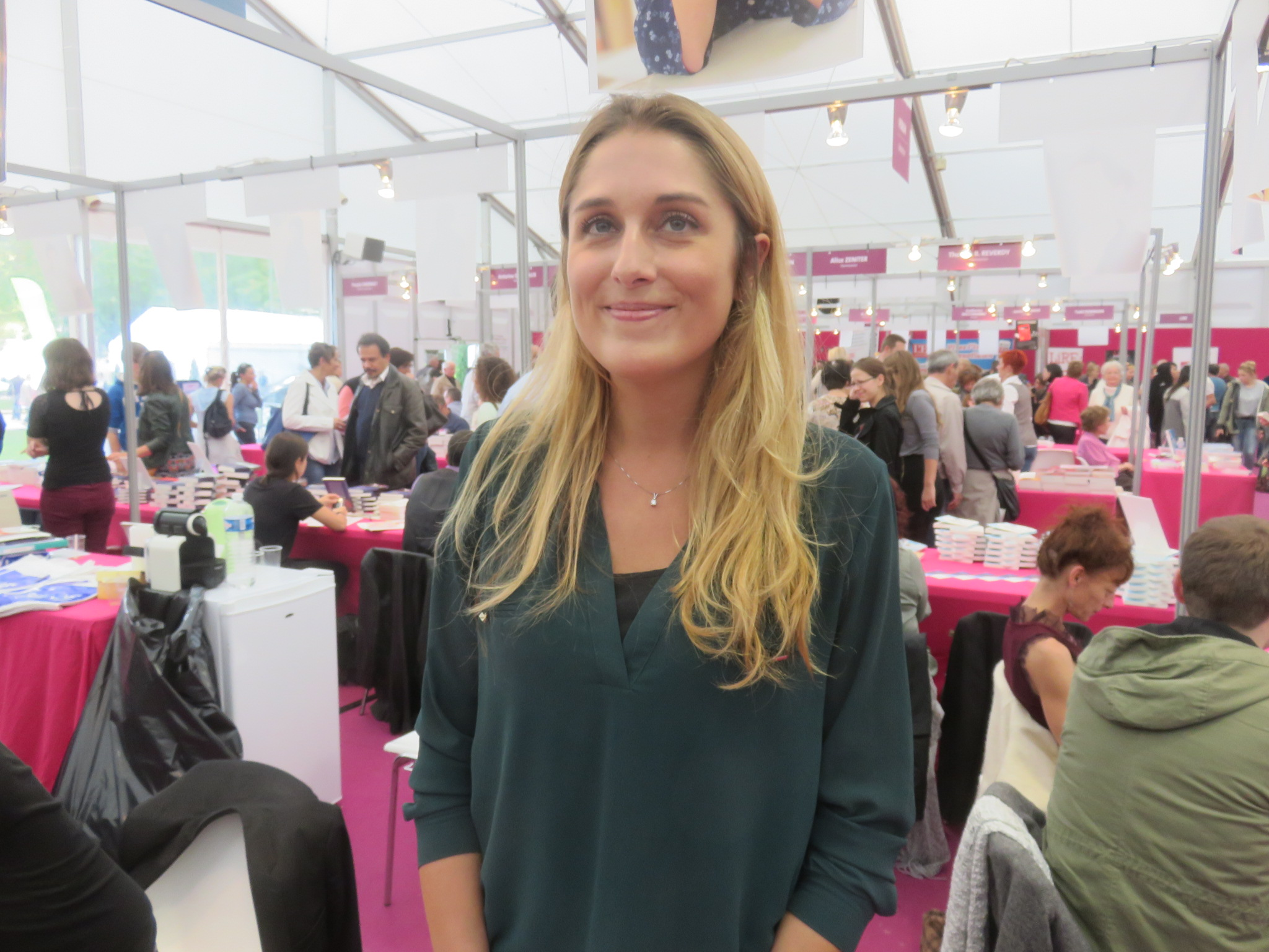 L'écrivain Jessica Nelson, au salon du livre les mots Doubs de Besançon en 2015